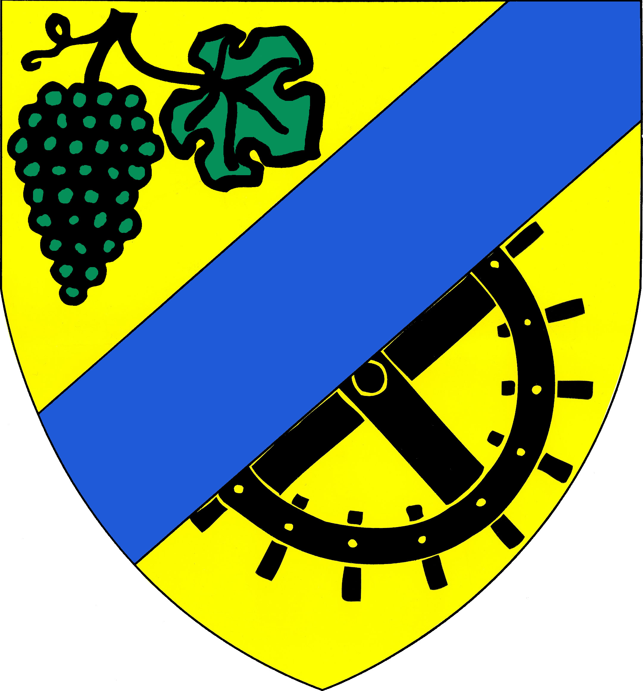 Der blaue Balken symbolisiert die Traisen die durch den Ort fließt und von Mühlen umgeben war. Die Trauben symbolisieren den reichen Weinbau der in der gesamten Region zu deren Entwicklung beitrug.